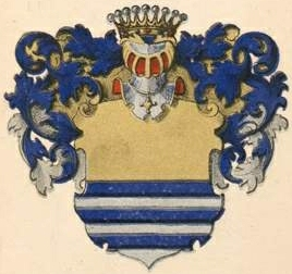 Clapier de Colongue´i suguvõsa aadlivapp